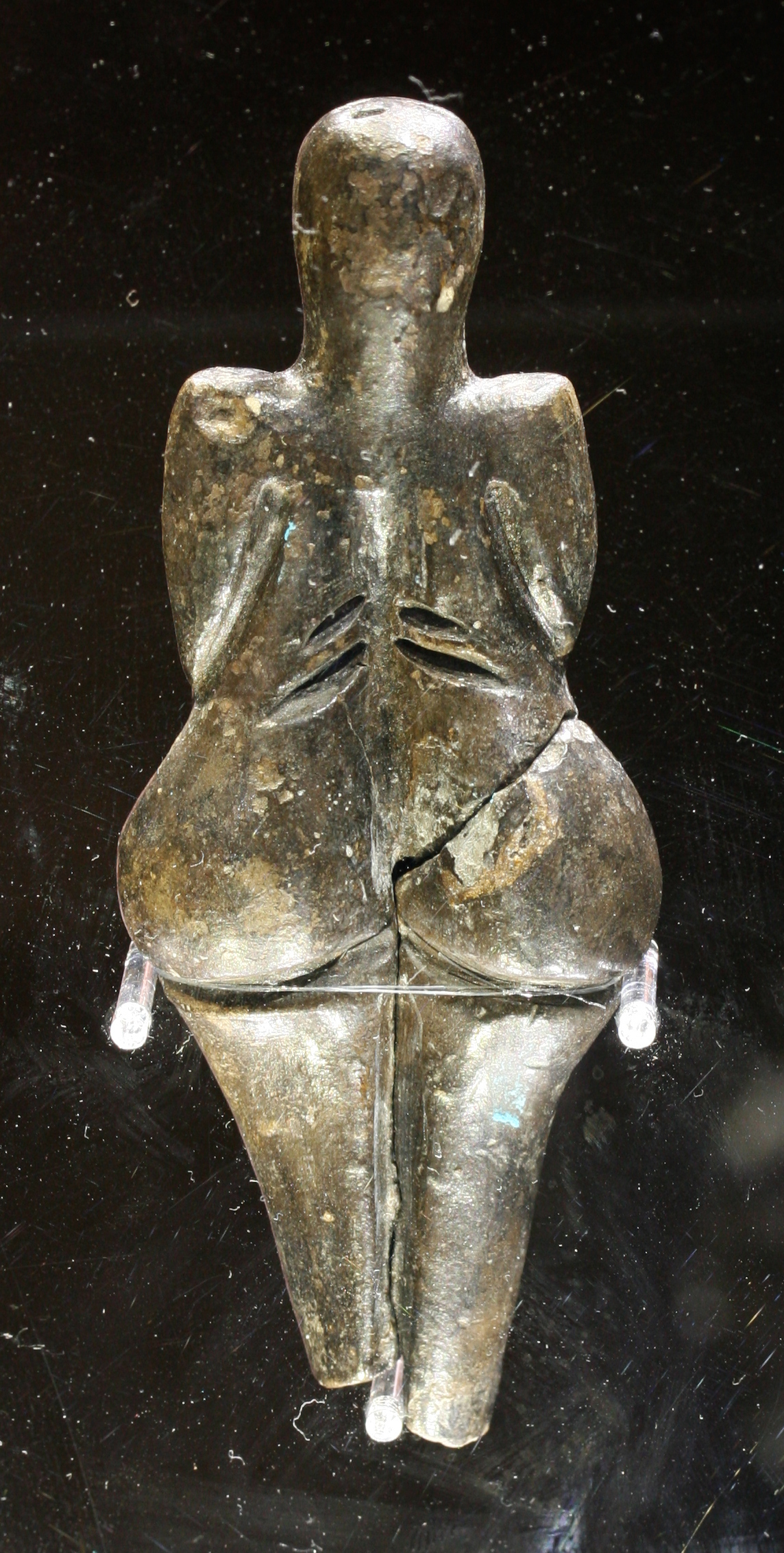 Věstonická venuše na výstavě Lovci mamutů v Národním muzeu v Praze (zezadu)